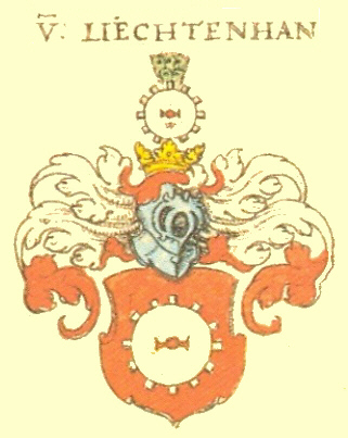 Wappen der Thüringischen Adelsfamilie Lichtenhain